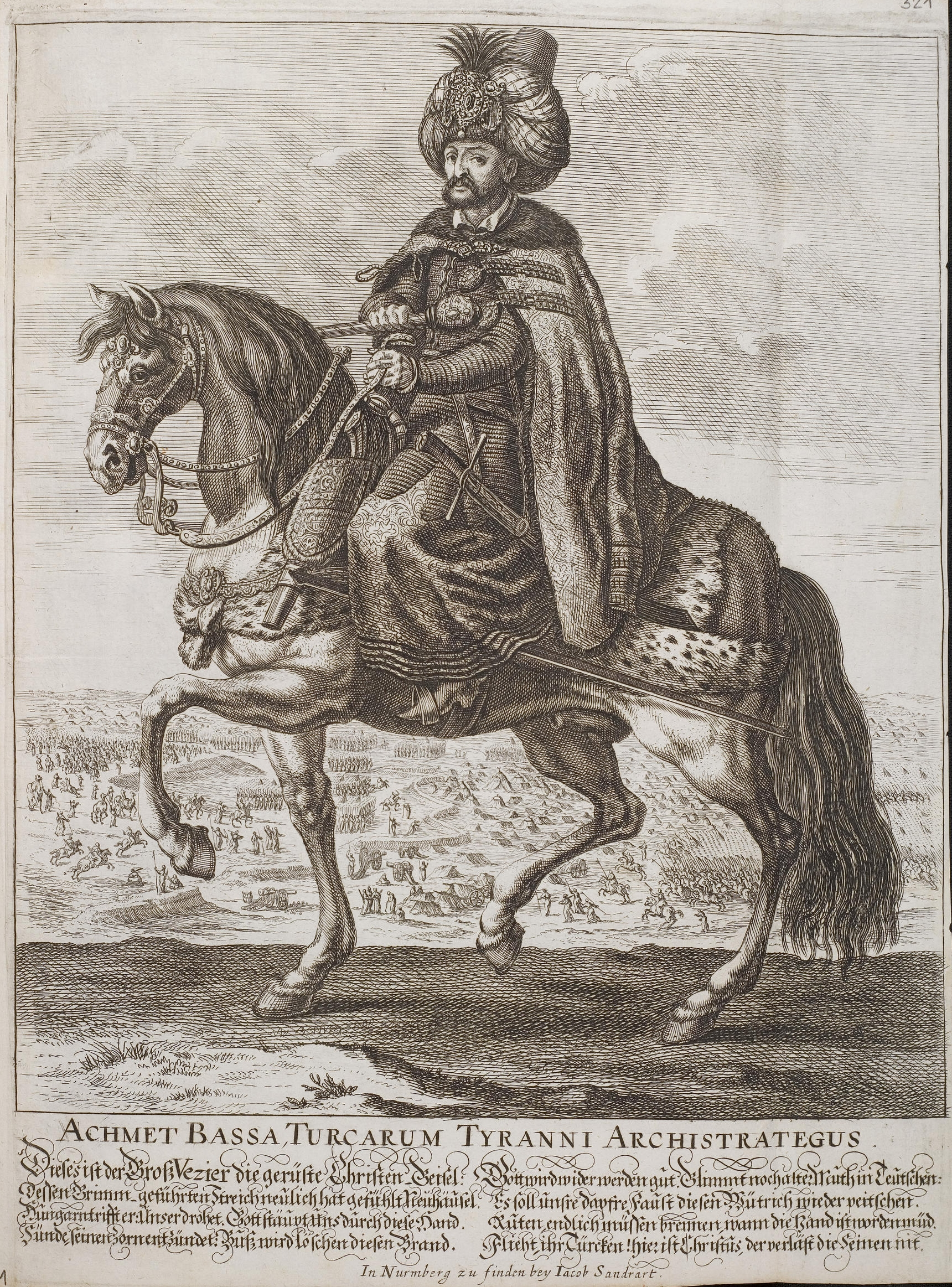 Grafik aus dem Klebeband Nr. 2 der Fürstlich Waldeckschen Hofbibliothek Arolsen Motiv: "Achmet Bassa Turcarum Tyranni Archistrategus" (Köprülü Fâzıl Ahmed Pascha) mit Gedicht von Sigmund von Birken (erwähnt ist die Belagerung Neuhäusels (Nové Zámky) im Türkenkrieg 1663/1664